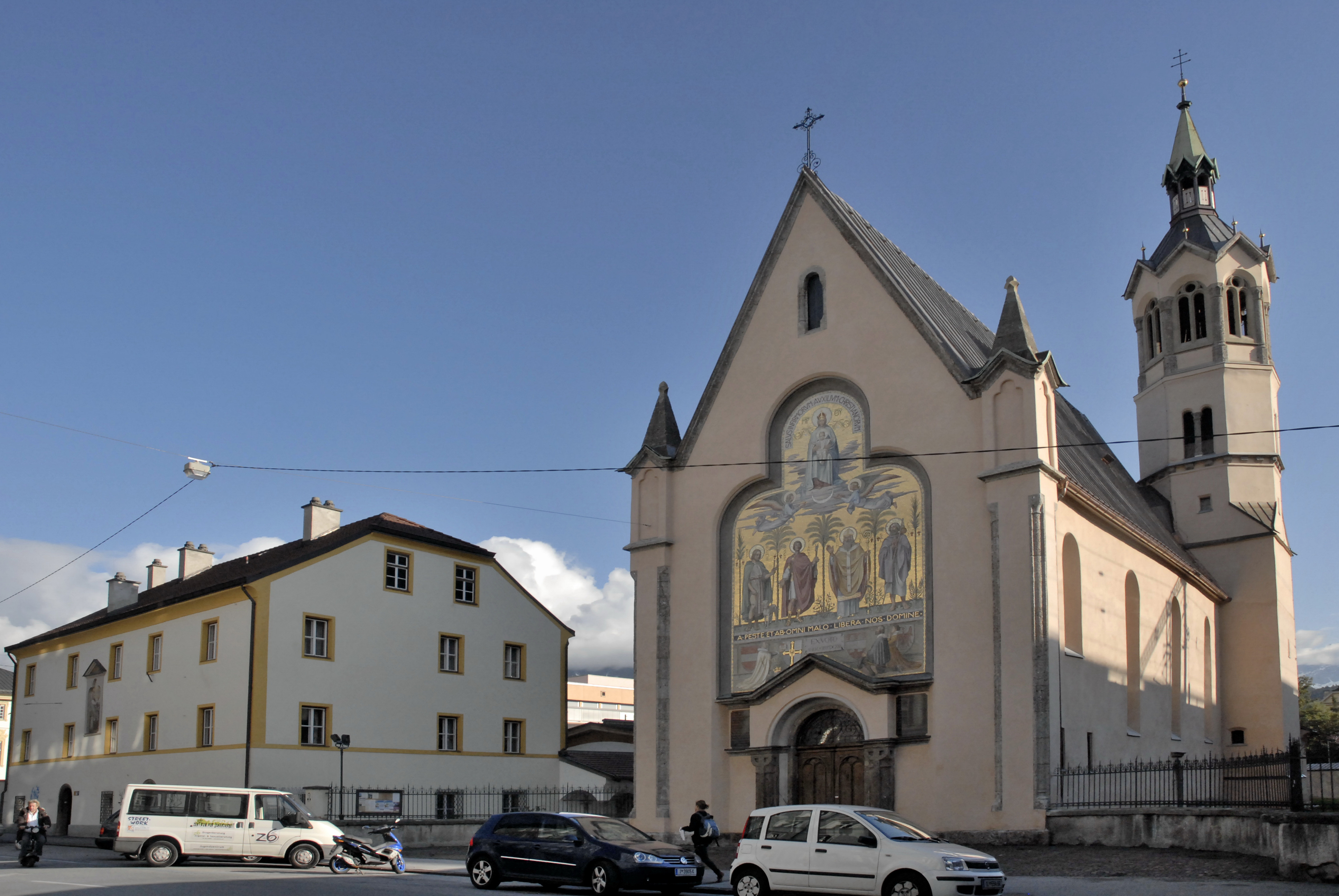 Innsbruck, Pfarrkirche und Widum Dreiheiligen von Norden